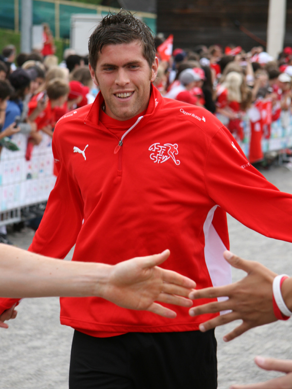 Benjamin Huggel im Trainingslager der Schweizer Fussballnationalmannschaft vor der Euro 2008